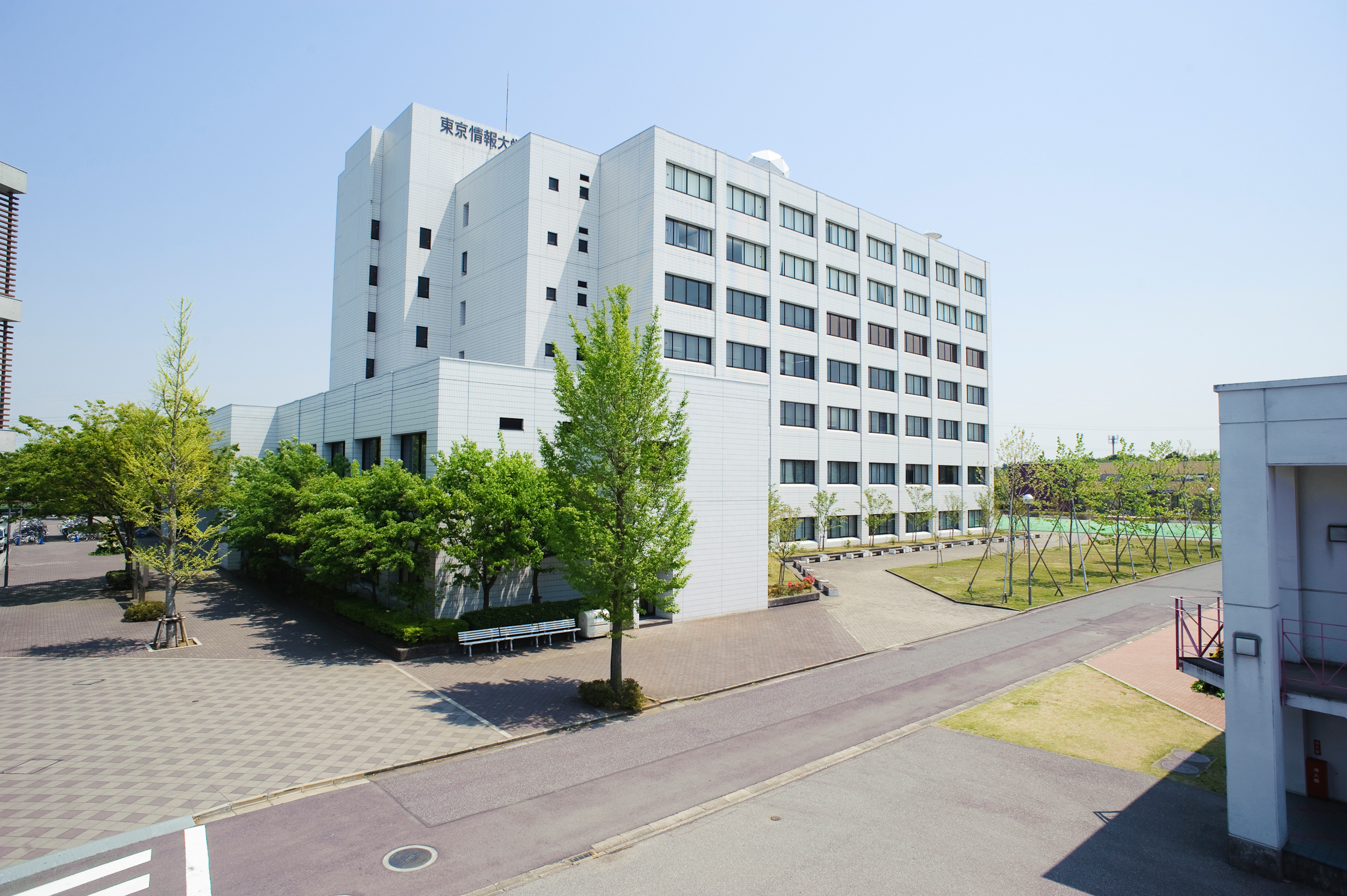 Tokyo university of information sciences